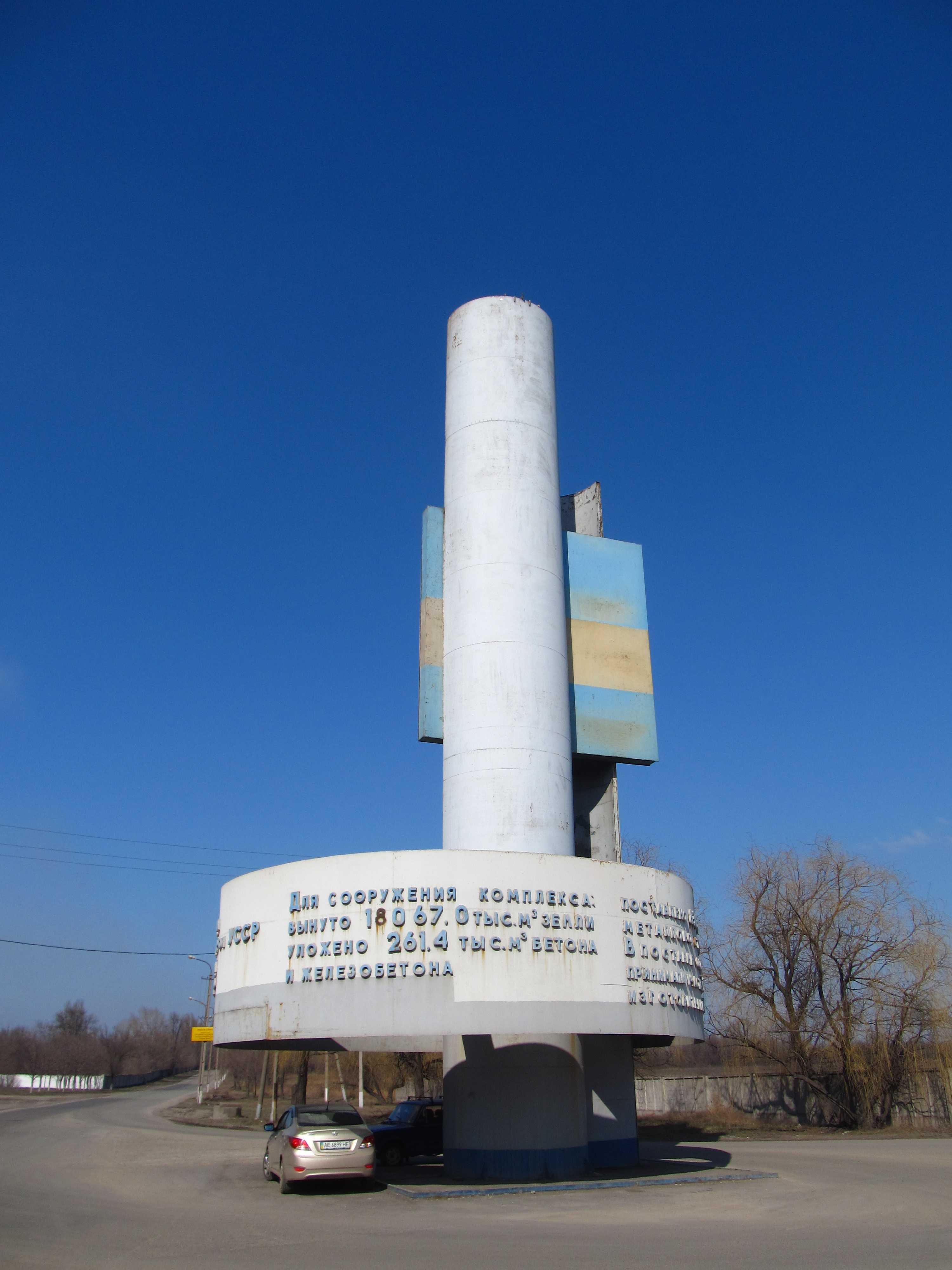 Пам’ятний знак на честь будівництва дев’ятої доменної печі